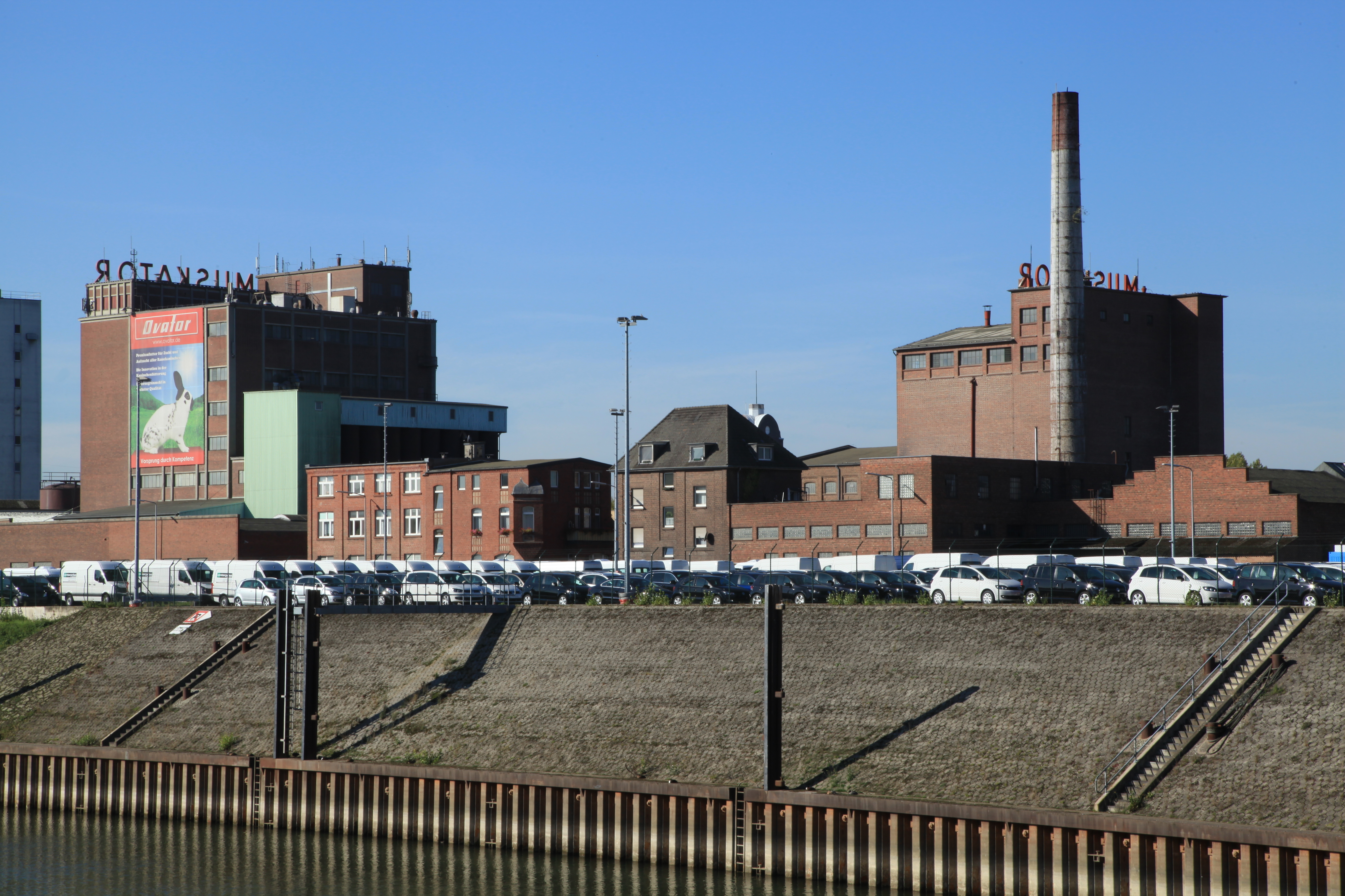 Blick von der Kesselstraße auf die Muskator-Werke und das Hafenbecken B in Düsseldorf